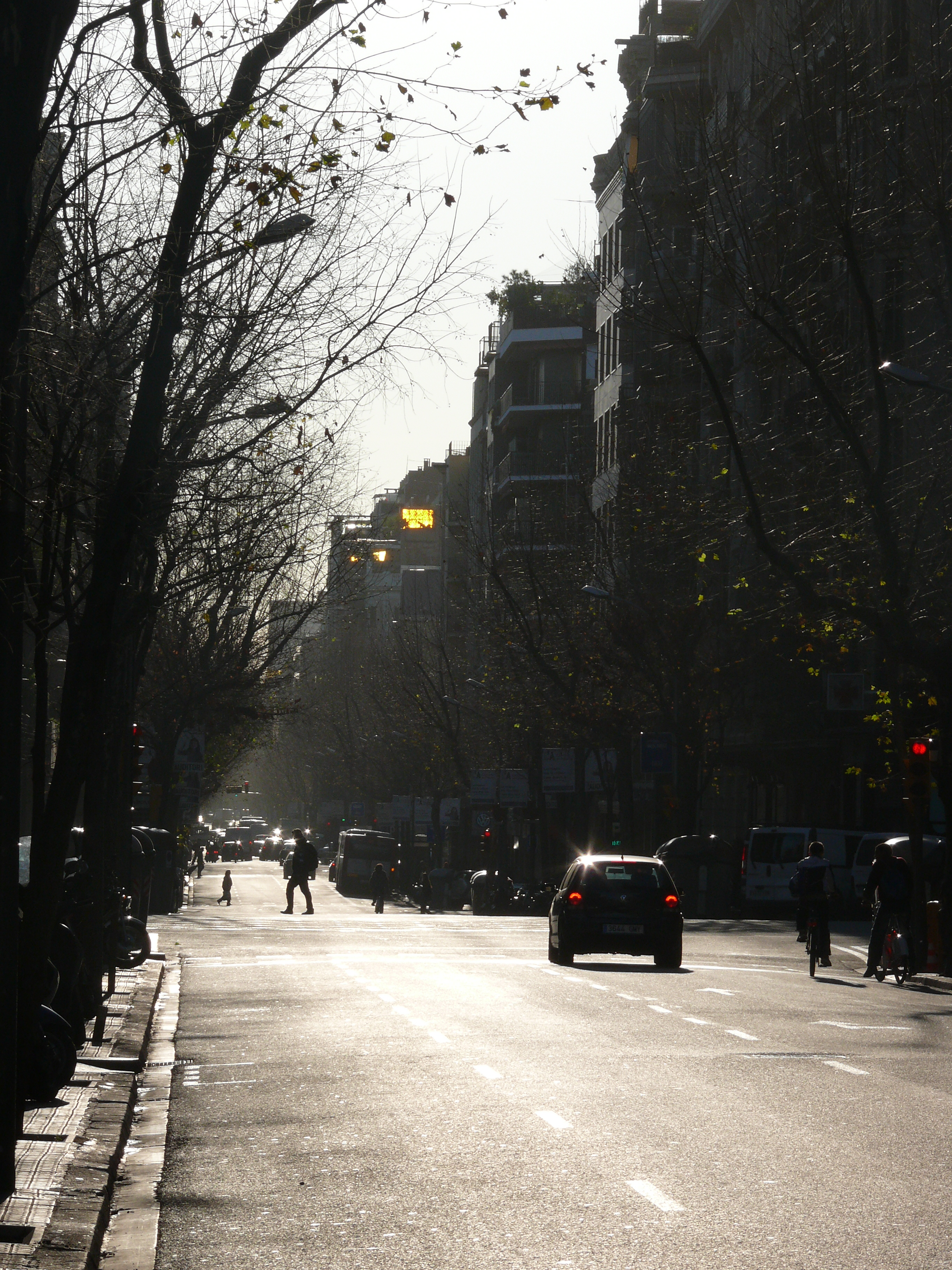 L'eixample izquierda - Barcelona